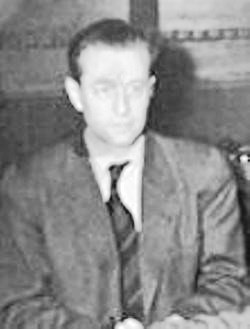 Defendant Hans Fritzsche.